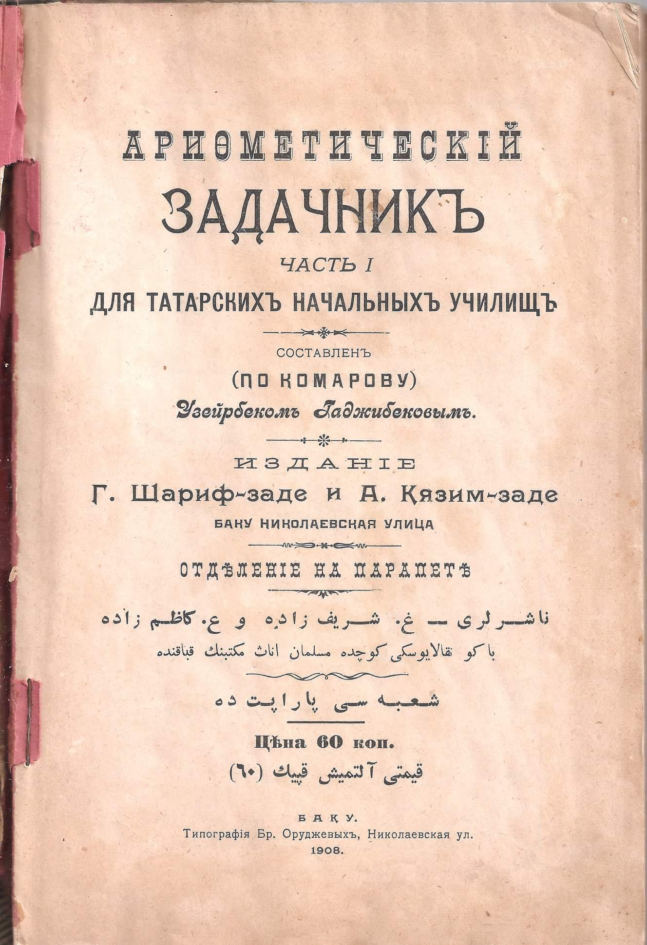 Книга Узеира Гаджибекова, «Арифметический задачник» изданный Гуламрзой Шарифзаде и Аббасгулу Кязымзаде в 1908 году